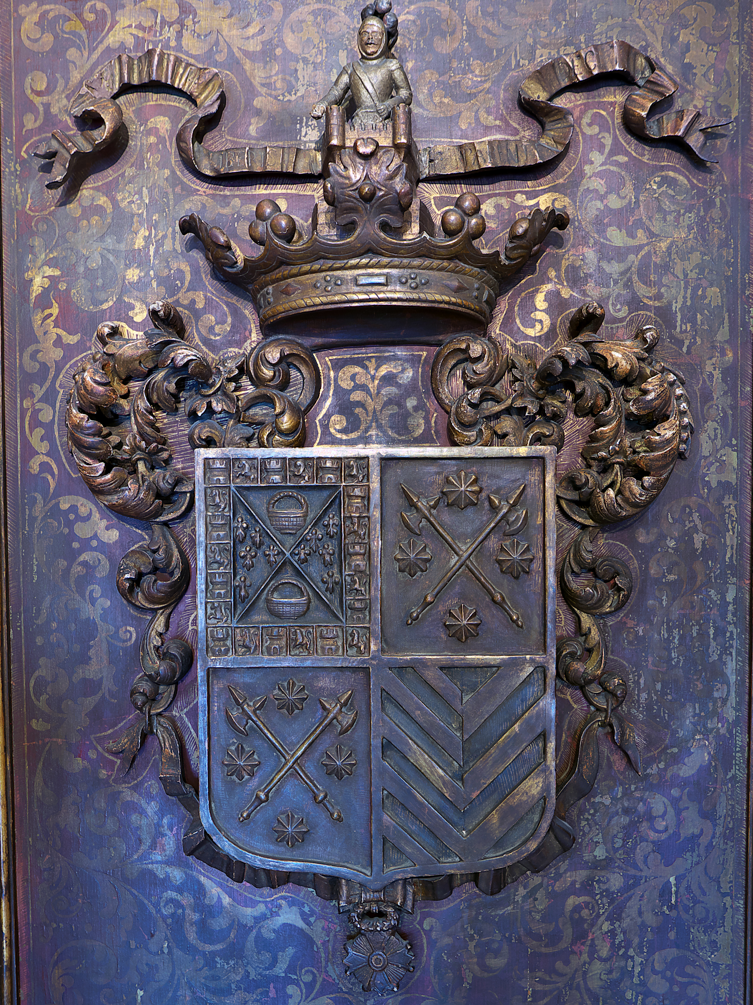 Marquesado de Jerez de los Caballeros. Escudo de Manuel Pérez de Guzmán y Boza (†1929) casado con Adelaida Pickman y Pickman (†1942), I Marqués de Jerez de los Caballeros, Caballero de Alcántara y Académico de la Real Academia de Buenas Letras de Sevilla.